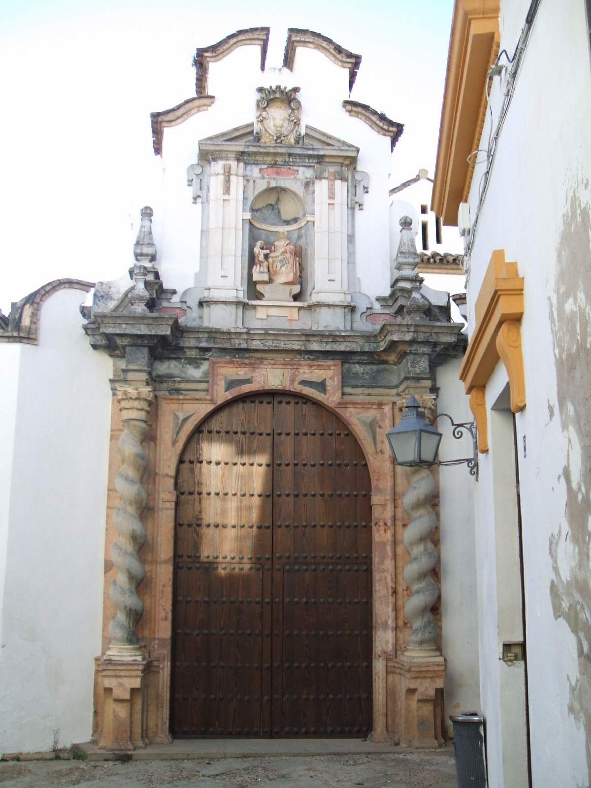 Ex Convento del Corpus Christi, sede de la Fundación Antonio Gala para Jóvenes Creadores, en Córdoba (España)